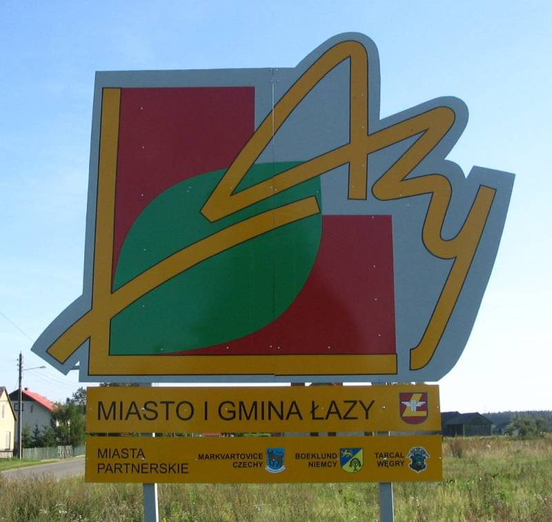 Tablica informacyjna ustawiana na granicy administracyjnej gminy Łazy, woj. śląskie (2005 rok).